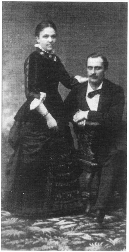 Elisabeth och Albert Janse. Ateljefoto från 1880.